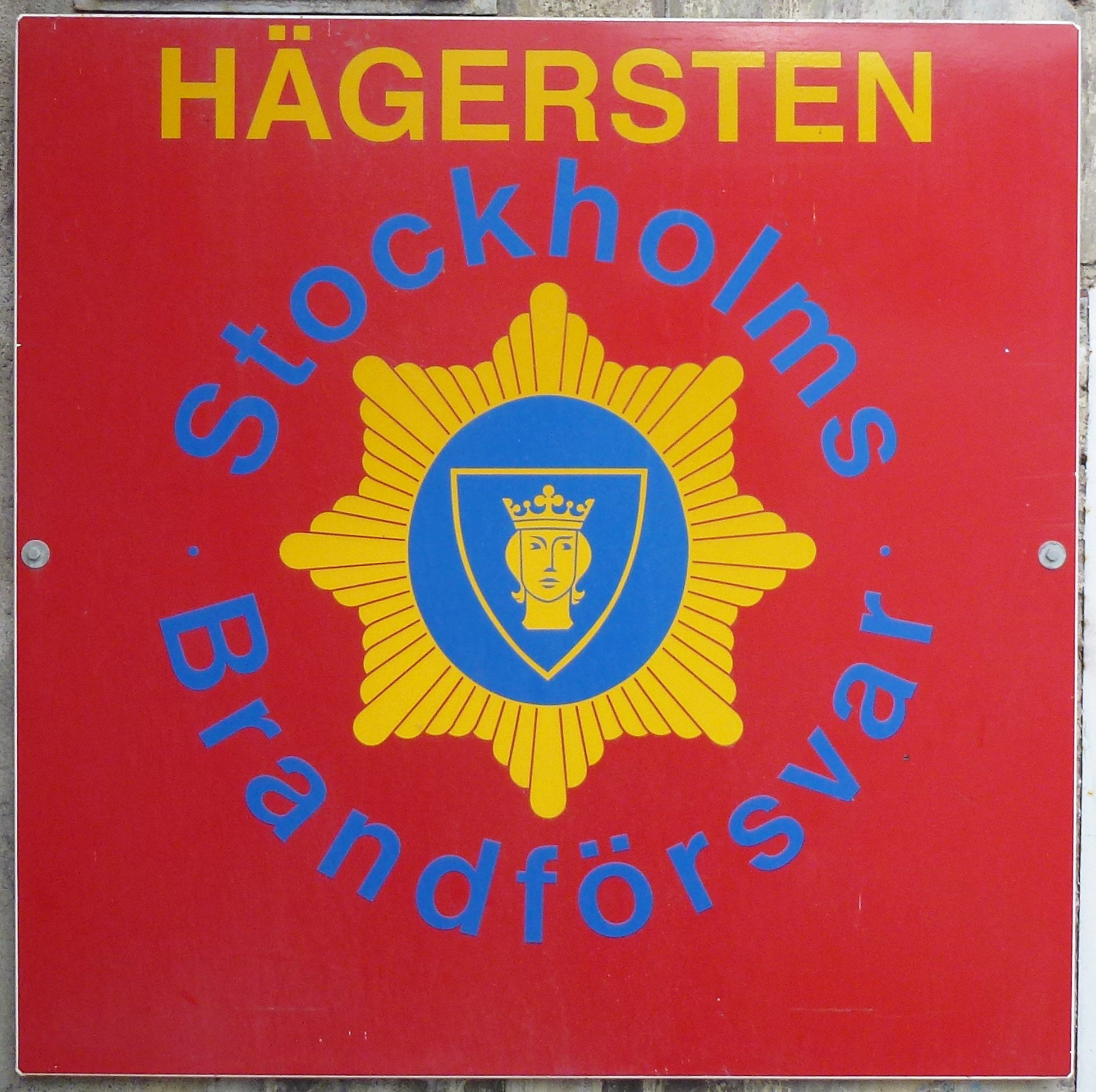 Hägerstens brandstation, skylt